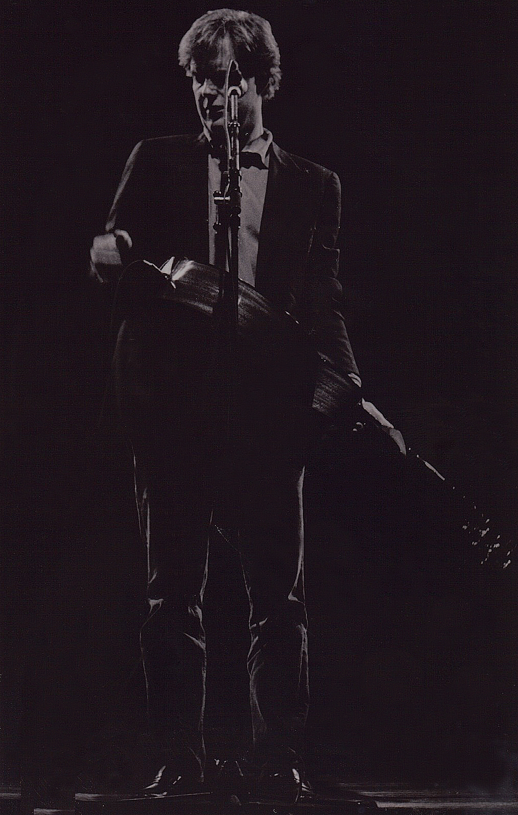 Leo Kottke joue en concert au Printemps de Bourges en 1992